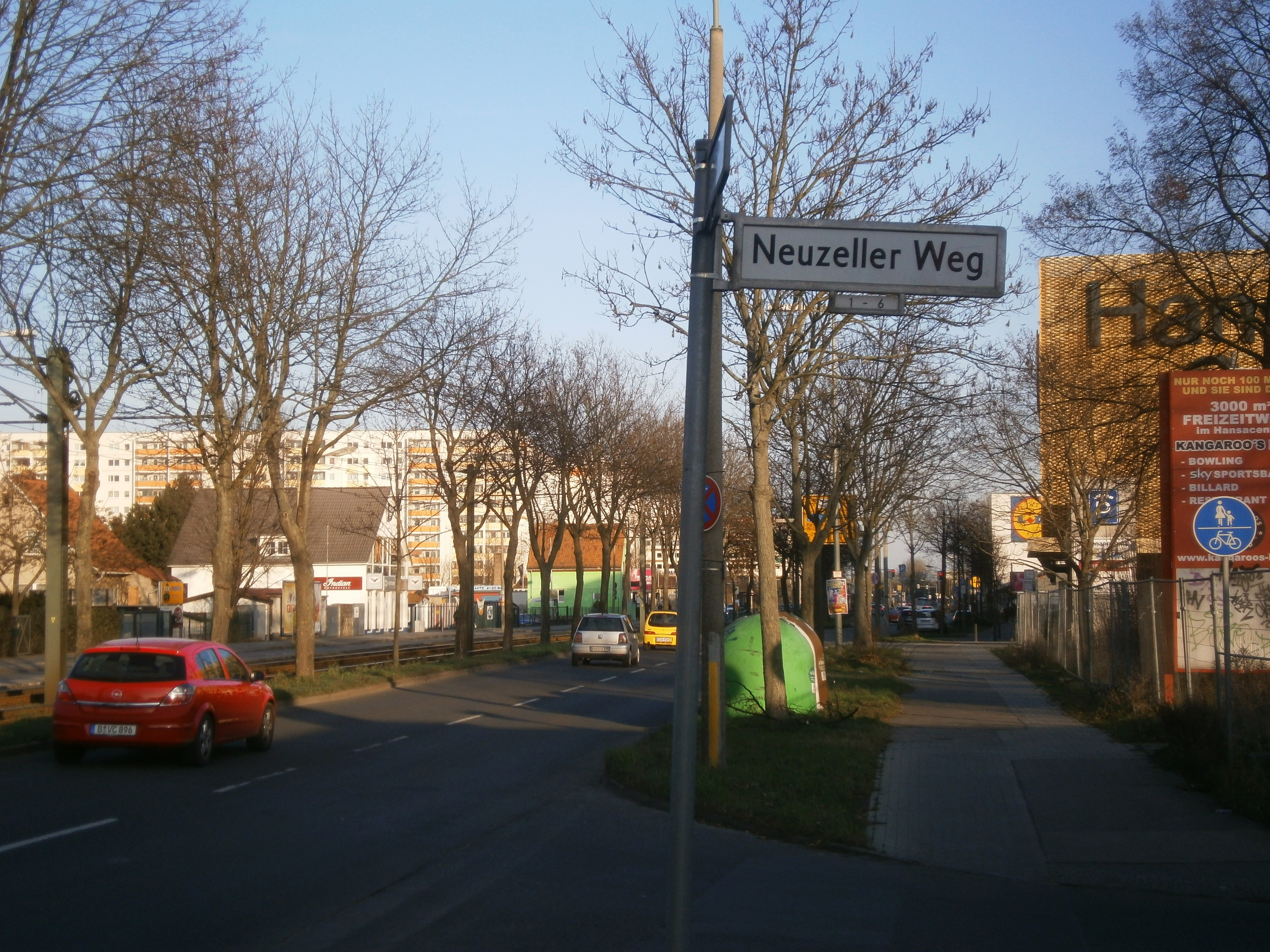 Die Hansastraße ist eine Straße mit übergeordneter Bedeutung in Berlin, den Ortsteilen Alt-Hohenschönhausen und Weißensee. Sie liegt zwischen der Indira-Gandhi-Straße und der Großsiedlung Hohenschönhausen-Nord. Das Nordende der Hansastraße wird ab Höhe Neuzeller Weg an der Ostseite vom Hansacenter und auf der Westseite von den bereits (seit 1920) an der Falkenberger Straße erbauten Siedlungshäusern bestimmt.